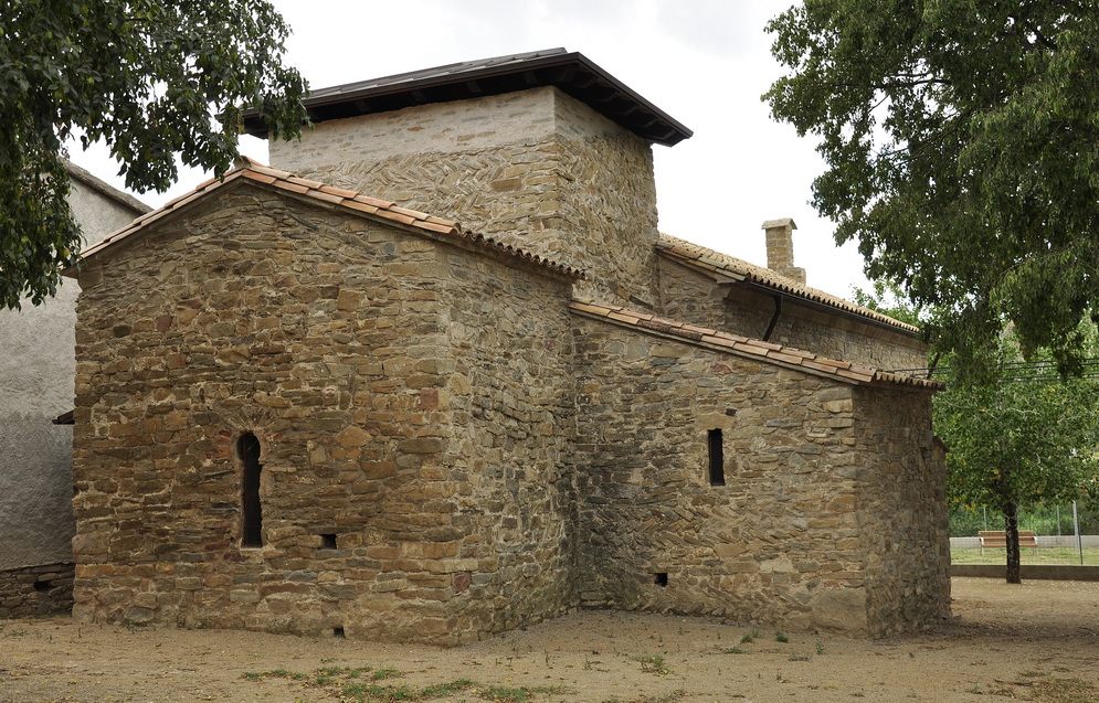 Santa Maria de Matadars, vista des des del nord-est